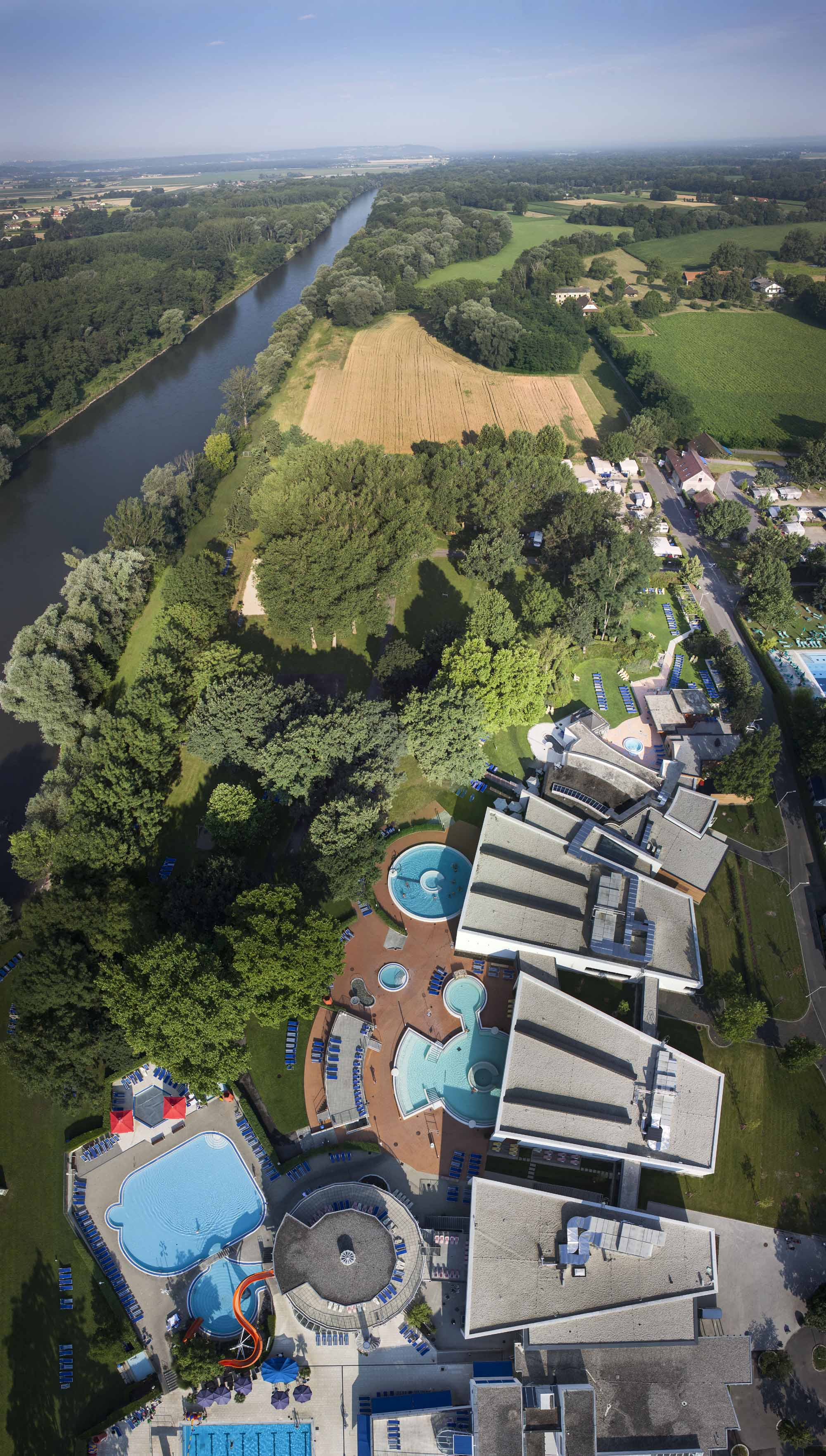 Die Parktherme Bad Radkersburg grenzt direkt an die Mur und liegt inmitten einer fünf Hektar großen natürlichen Parklandschaft, die vor allem im Sommer herrlichen Schatten spendet.